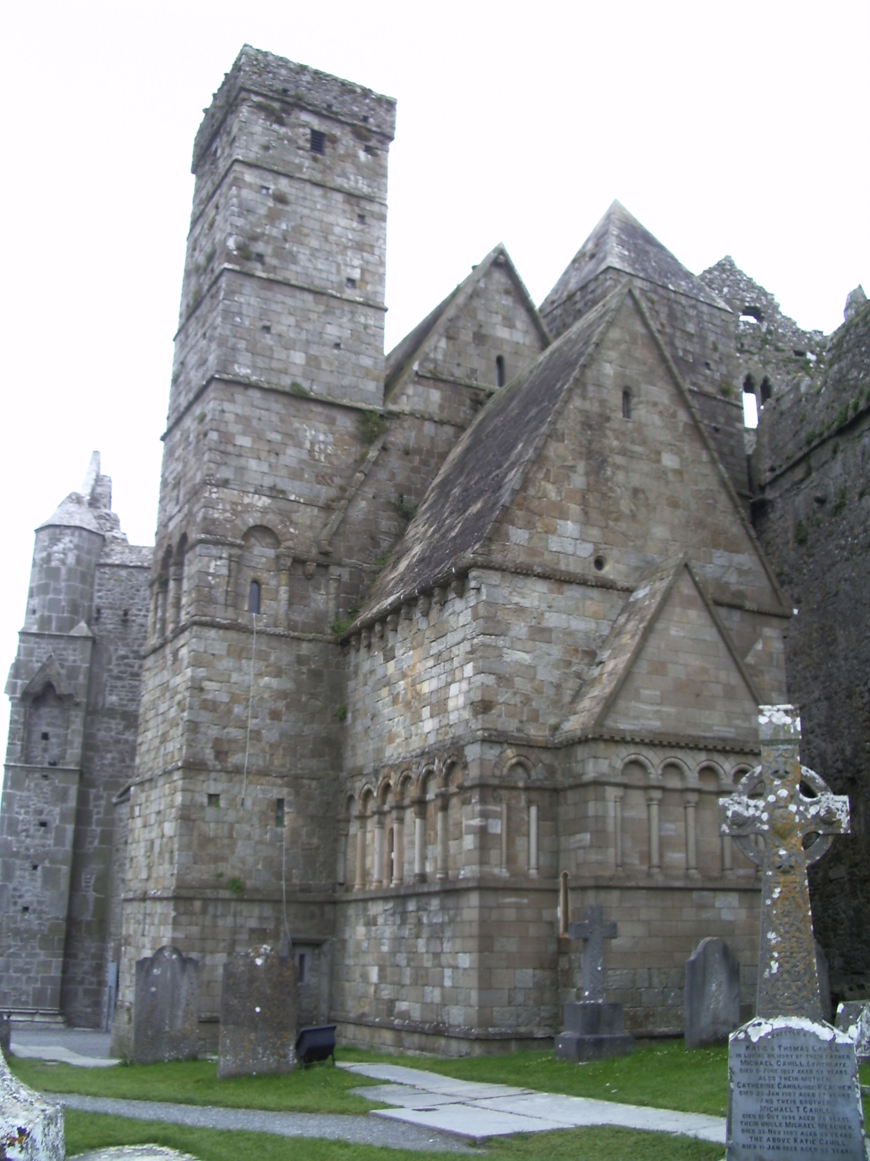 Cormac's Chapel, Rock of Cashel